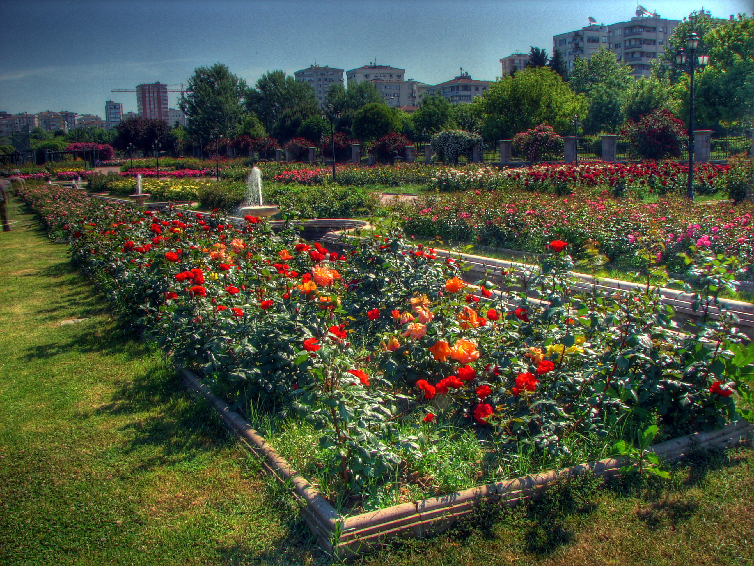 Göztepe Park, Istanbul, HDR image